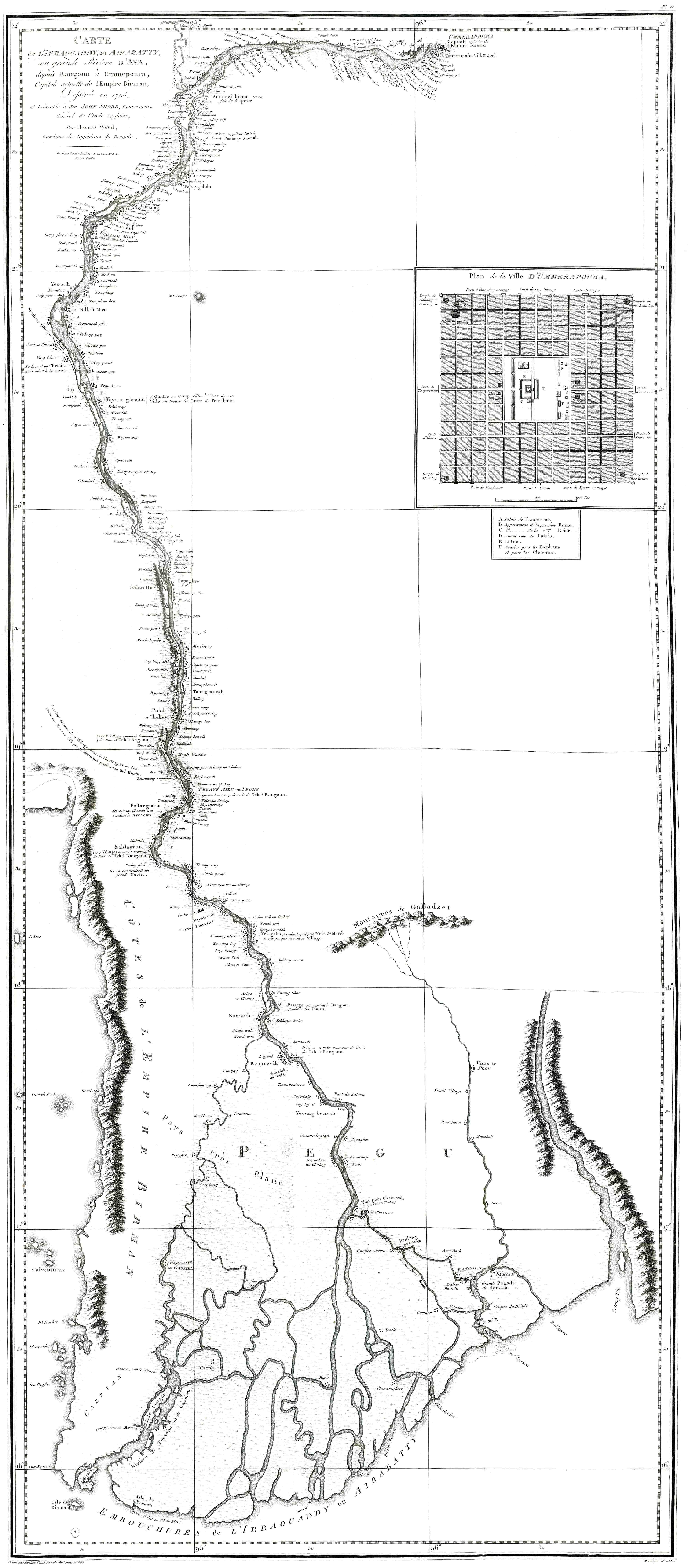 carte du fleuve Irrawaddy en 1792, avec description des villes et villages. Tirée de l'Atlas de la relation de l'Ambassade anglaise dans le royaume d'Ava, en 1795